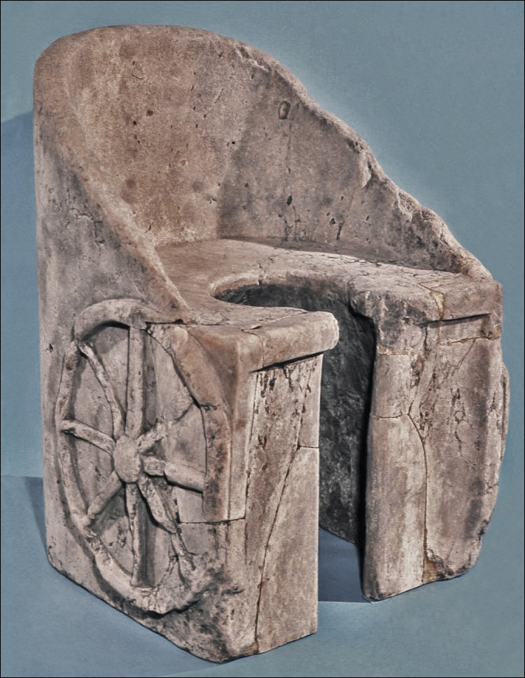 Latrines en marbre de Pavonazzetto en forme de chariot. Daté du 2e ou 3e siècle. Thermes d'Antonin (Caracalla) à Rome.